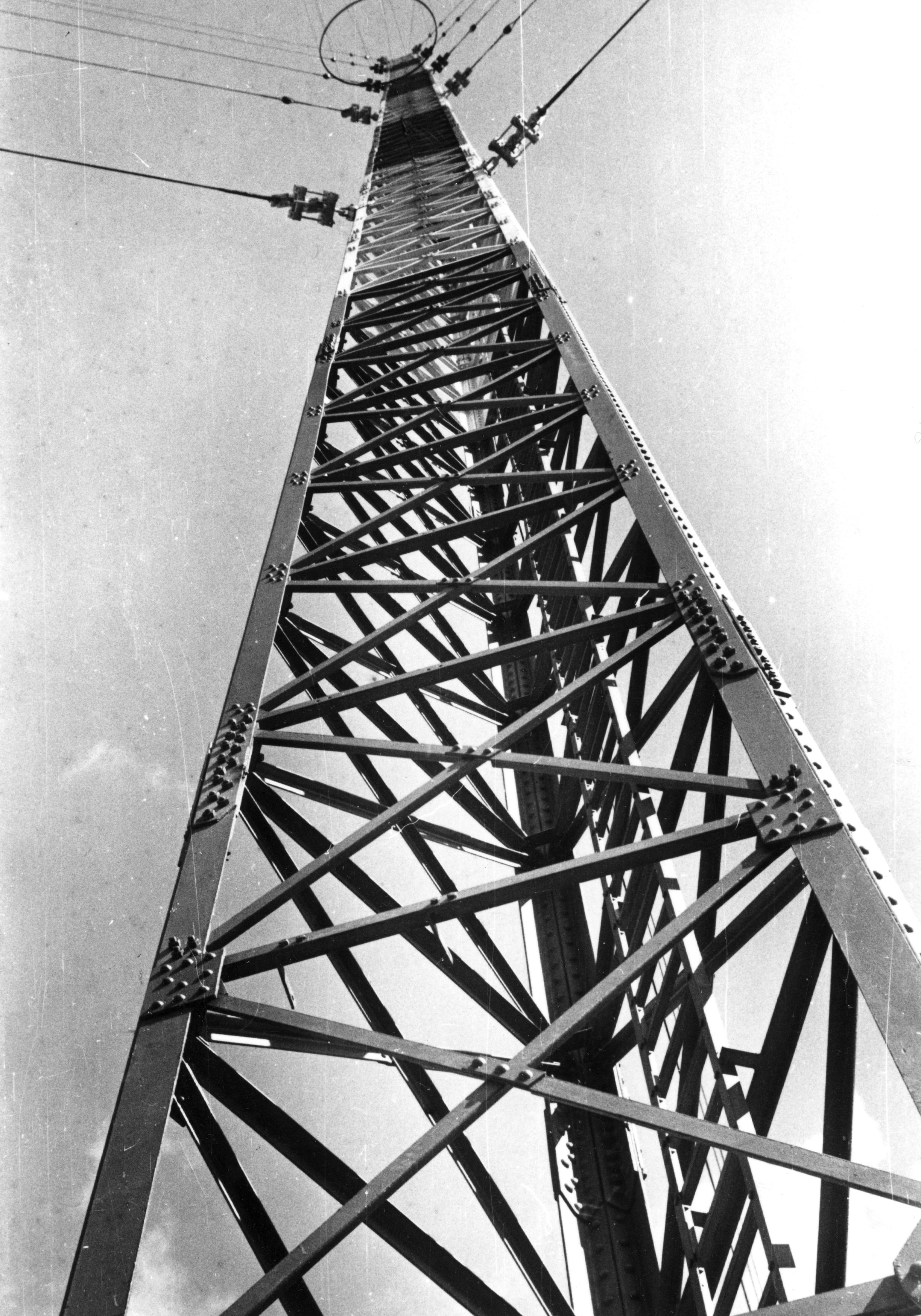 Maszt antenowy na terenie radiostacji w Łazach koło Raszyna